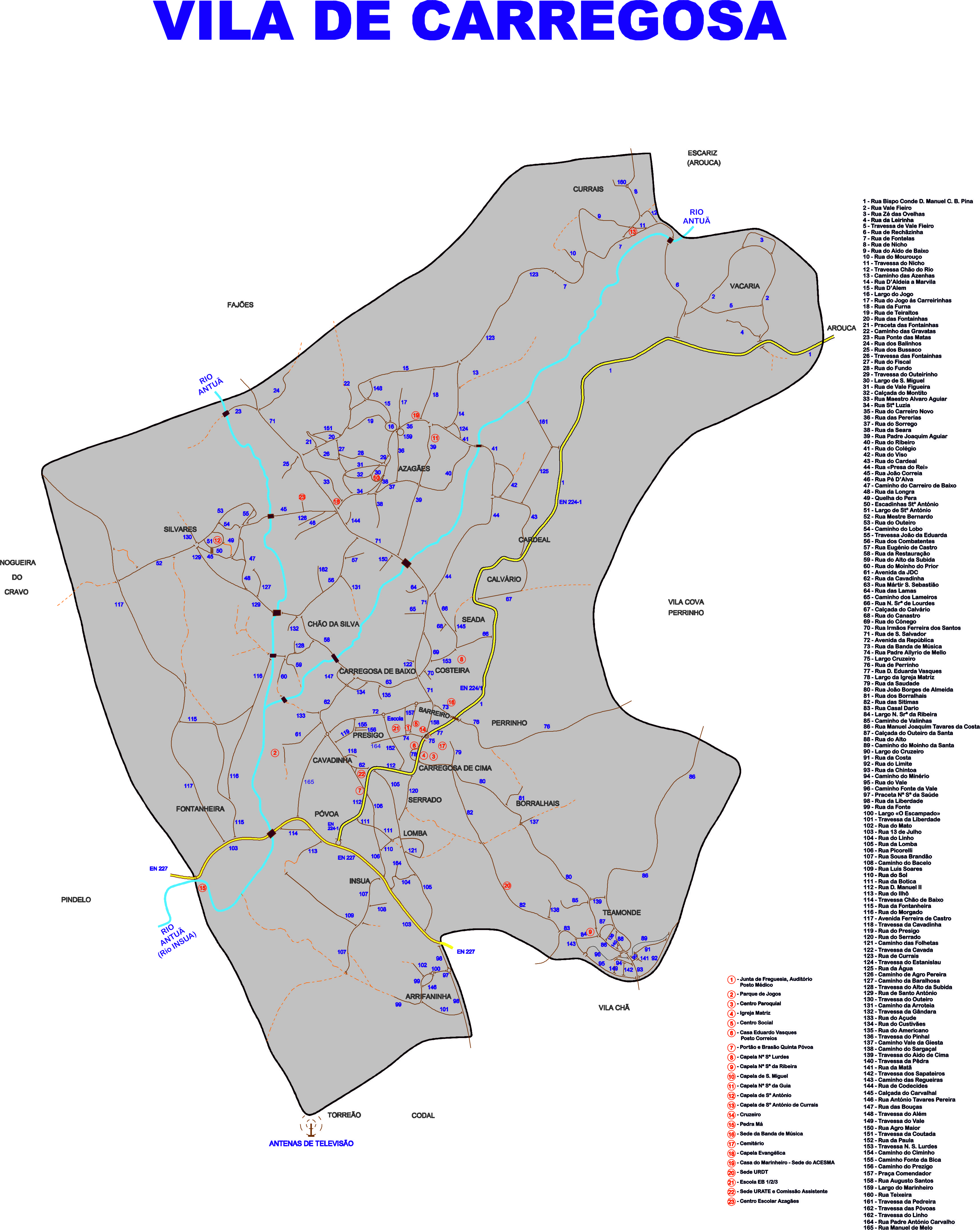 Mapa das ruas de carregosa